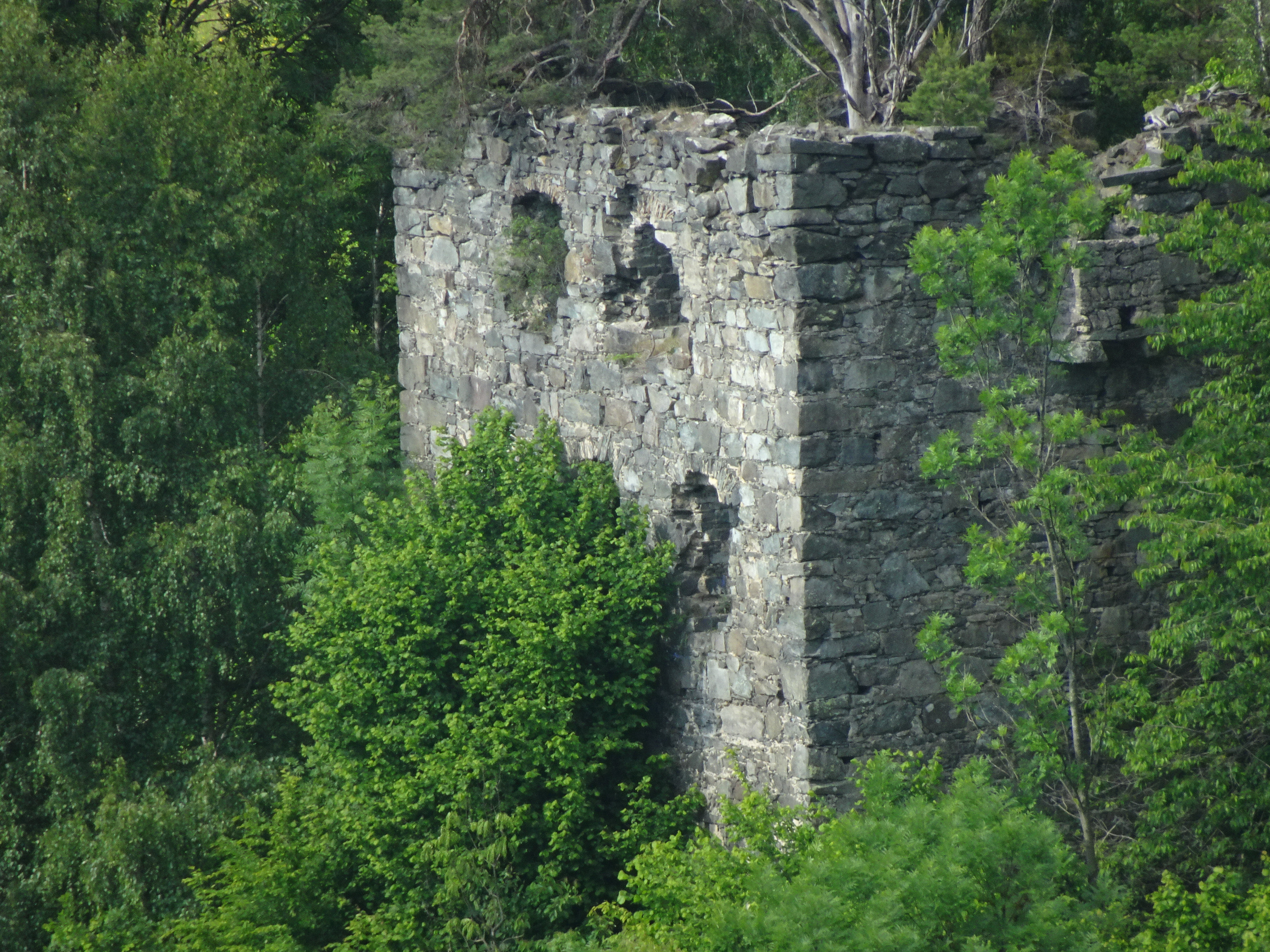 Kebelj, Slovenia